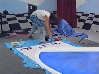 Christian W. Staudinger bei einer Performance auf der Internationalen Funkausstellung (IFA) Berlin